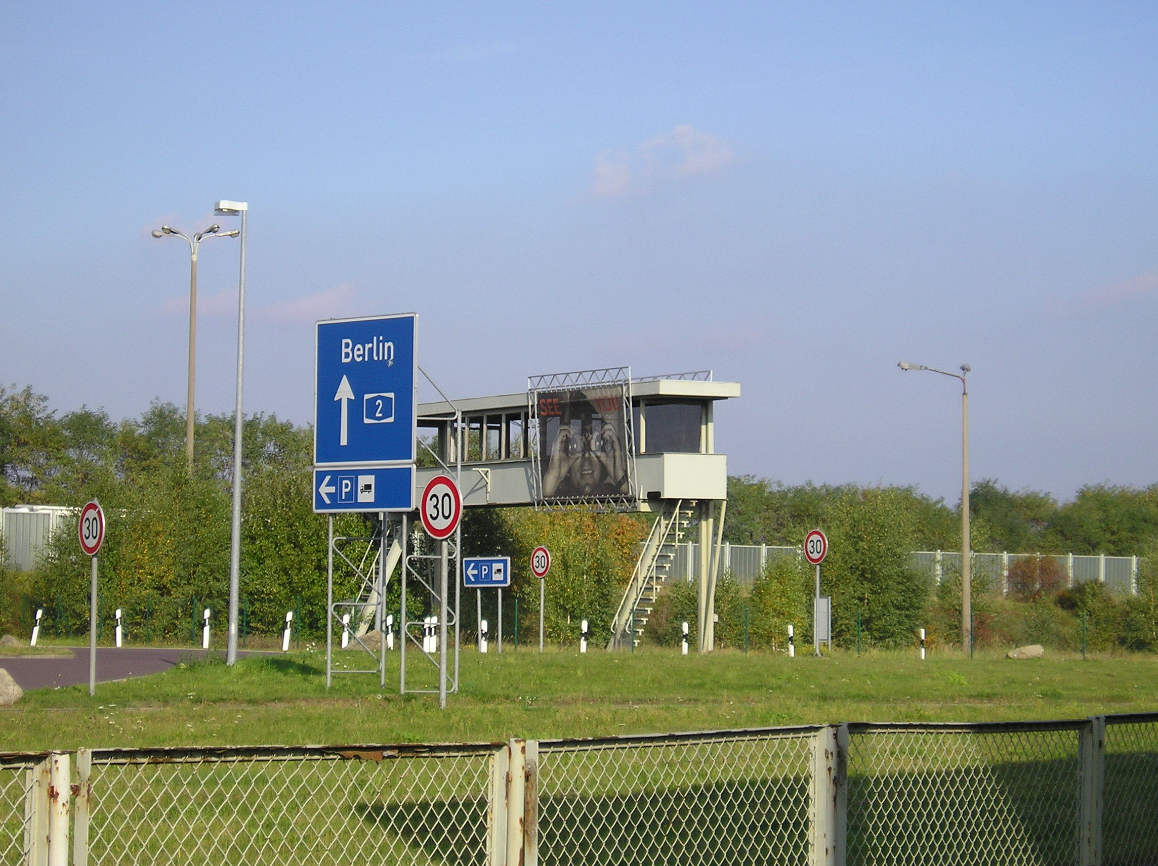 Grensovergang Helmstedt-Marienborn - brug